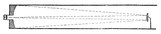 Fig. 2. - Coupe du télescope de Cassegrain pour La Nature, revue des sciences, n° 18, page 280.